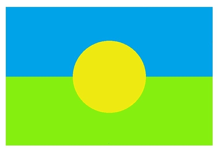 Imagen creada por mí a partir de esta: Puede haber imprecisiones en los colores y en las proporciones de diversos elementos.